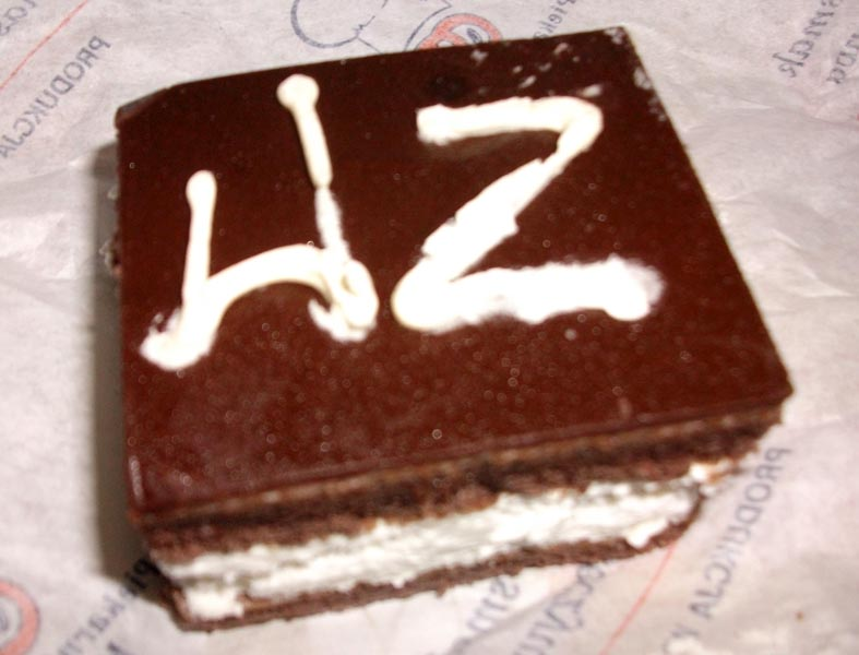 Ciastko W-Z czyli "wuzetka" z typową dekoracją.